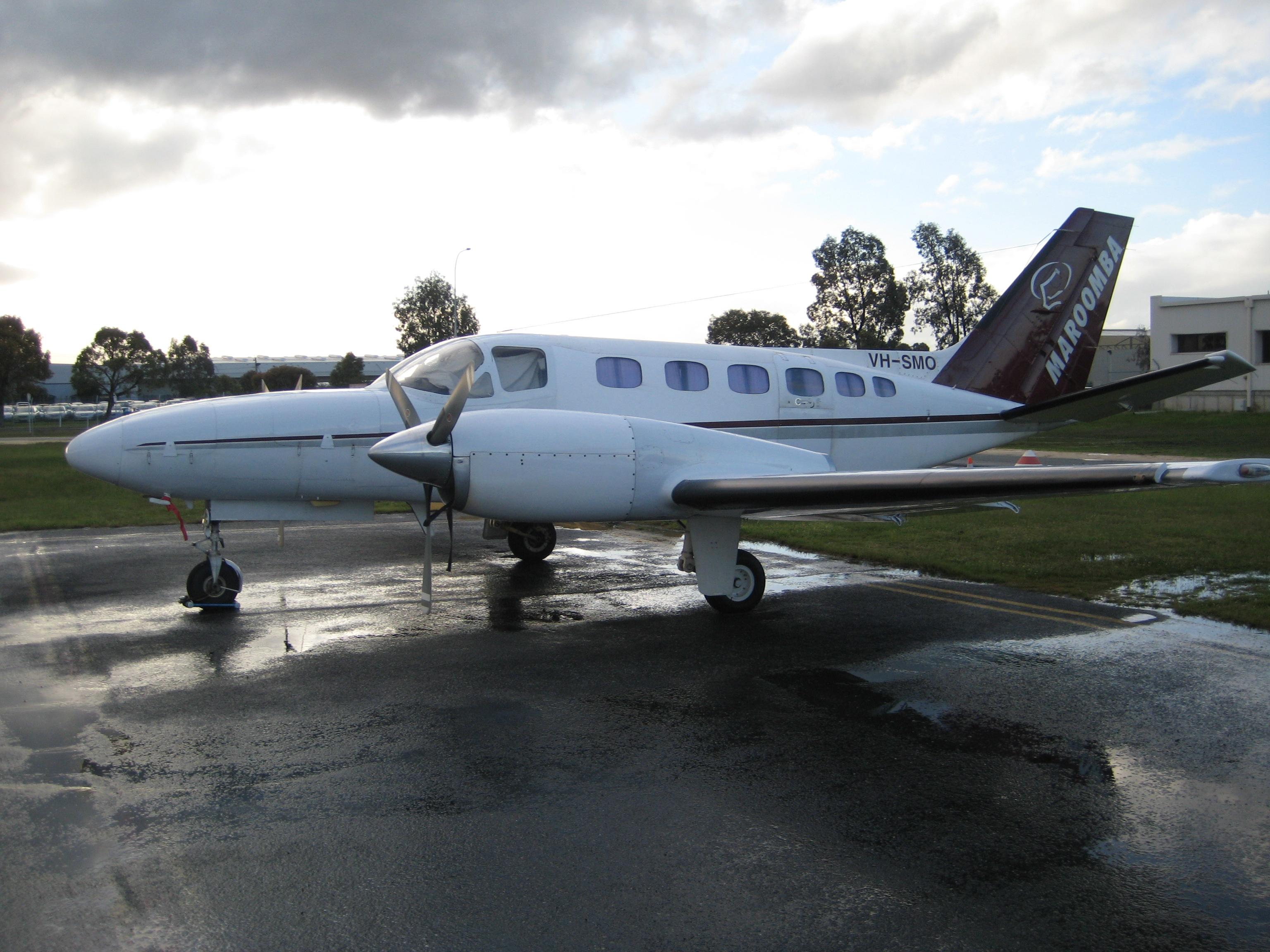 Marommba Airlines Cessna 441 Conquest VH-SMO